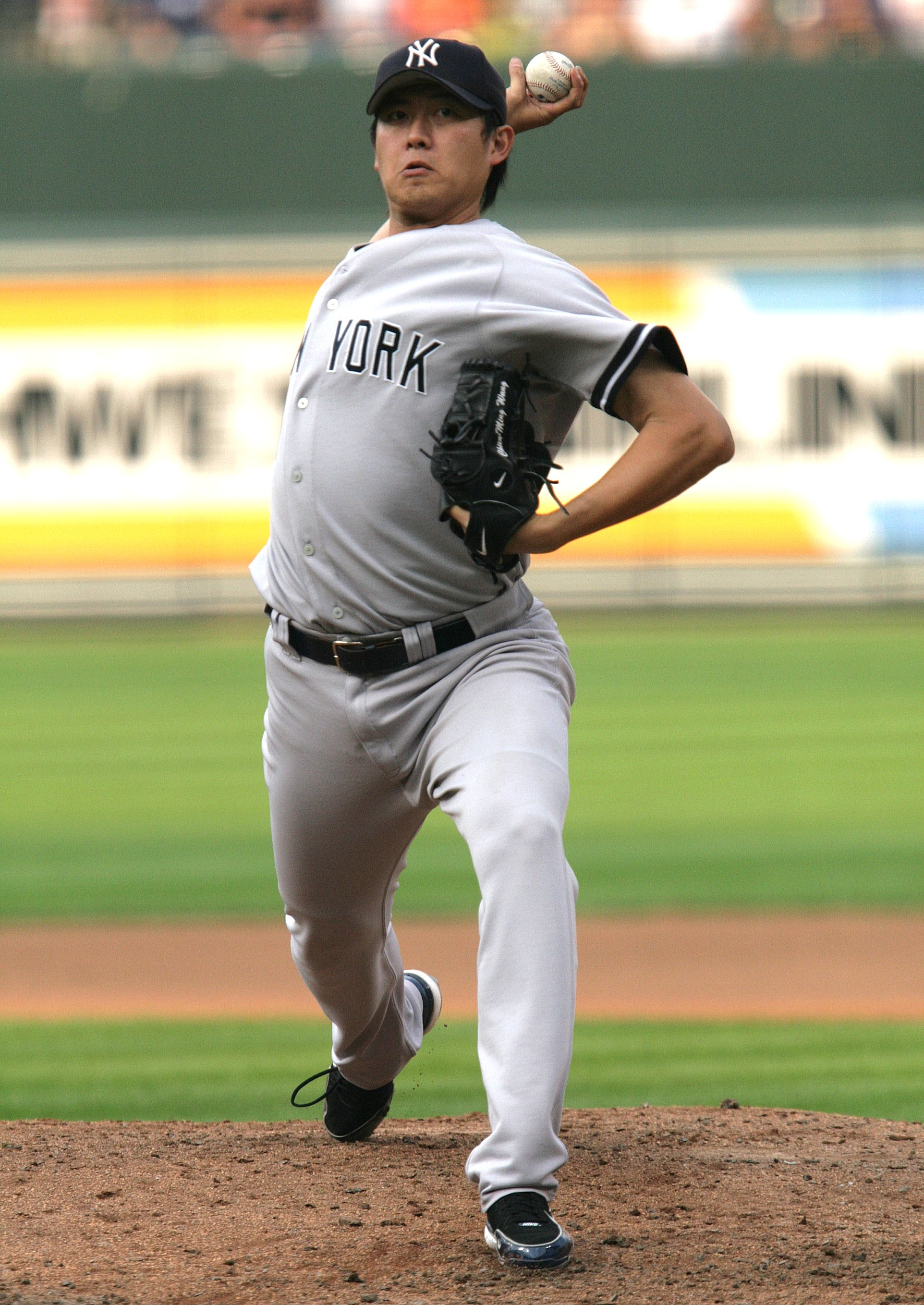 Chien-Ming Wang